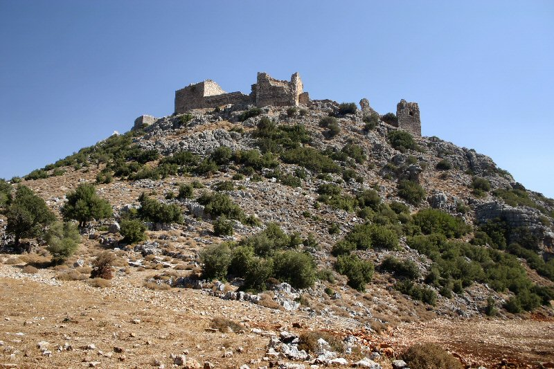 Bourzey Burg Fotograf: Mewes Quelle: eigenes Foto Datum: 2004 Lizenz: public domain